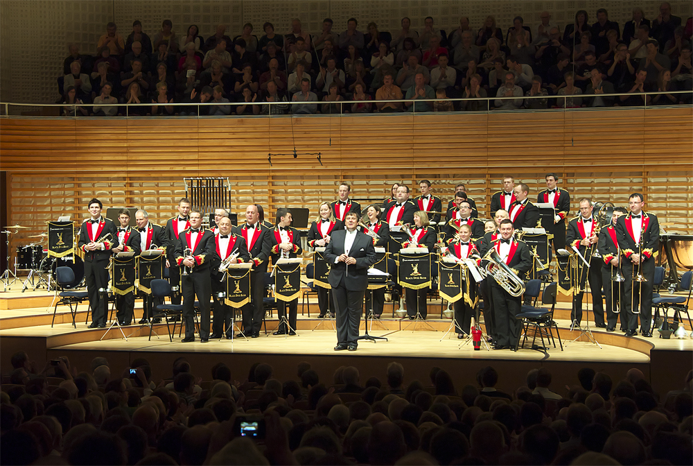 Brass-Gala mit der Black Dyke Band im Konzertsaal des KKL Luzern